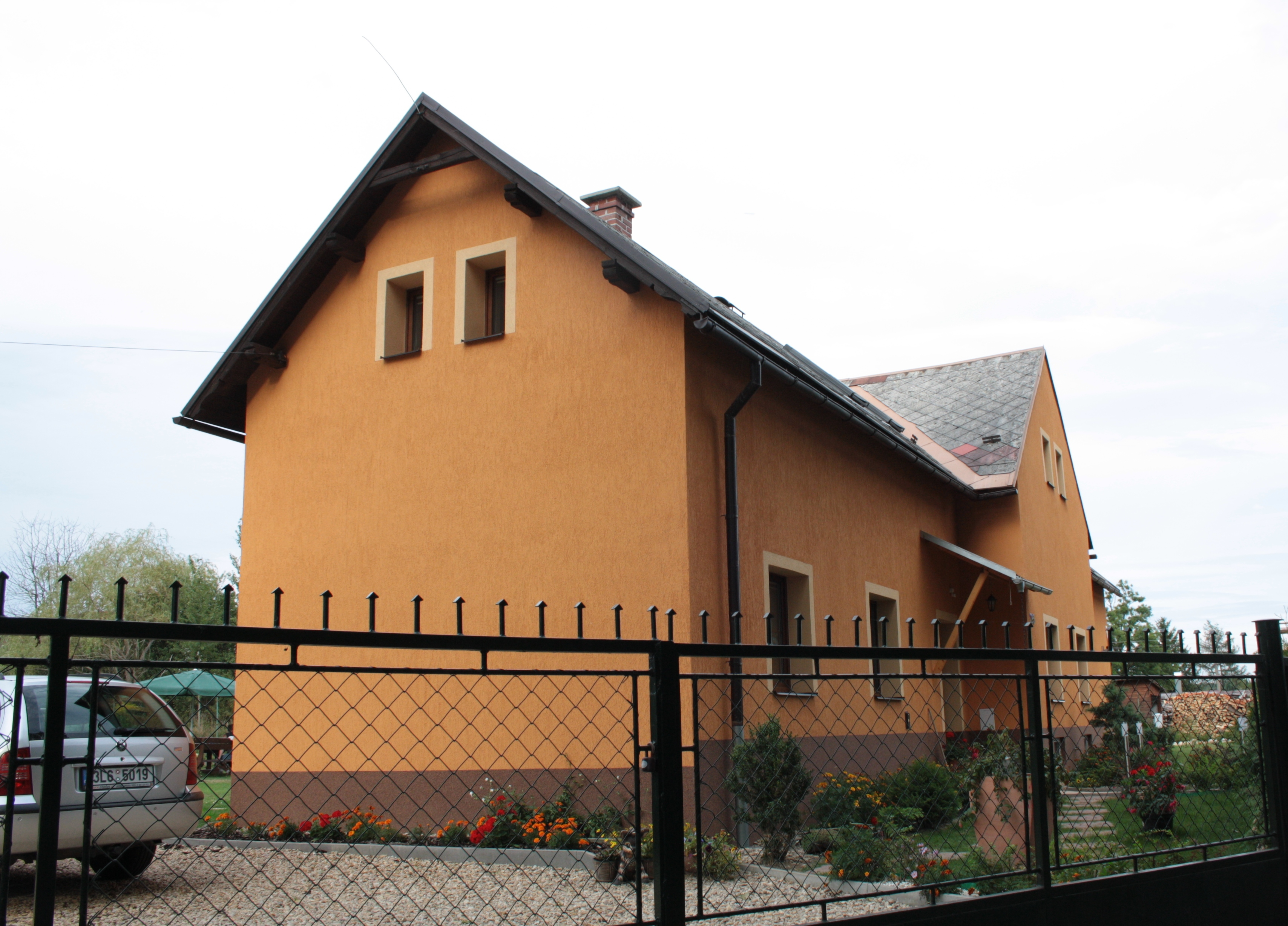 This photograph was taken with a DSLR from WMCZ's Camera grant. Dům číslo popisné 235 v Dětřichově v Libereckém okrese.